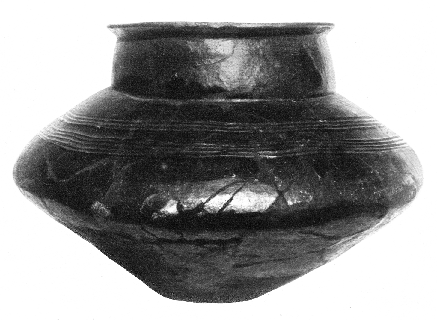 Urne der Urnenfeldkultur von Truchtelfingen, Museum für Vor- und Frühgeschichte Berlin